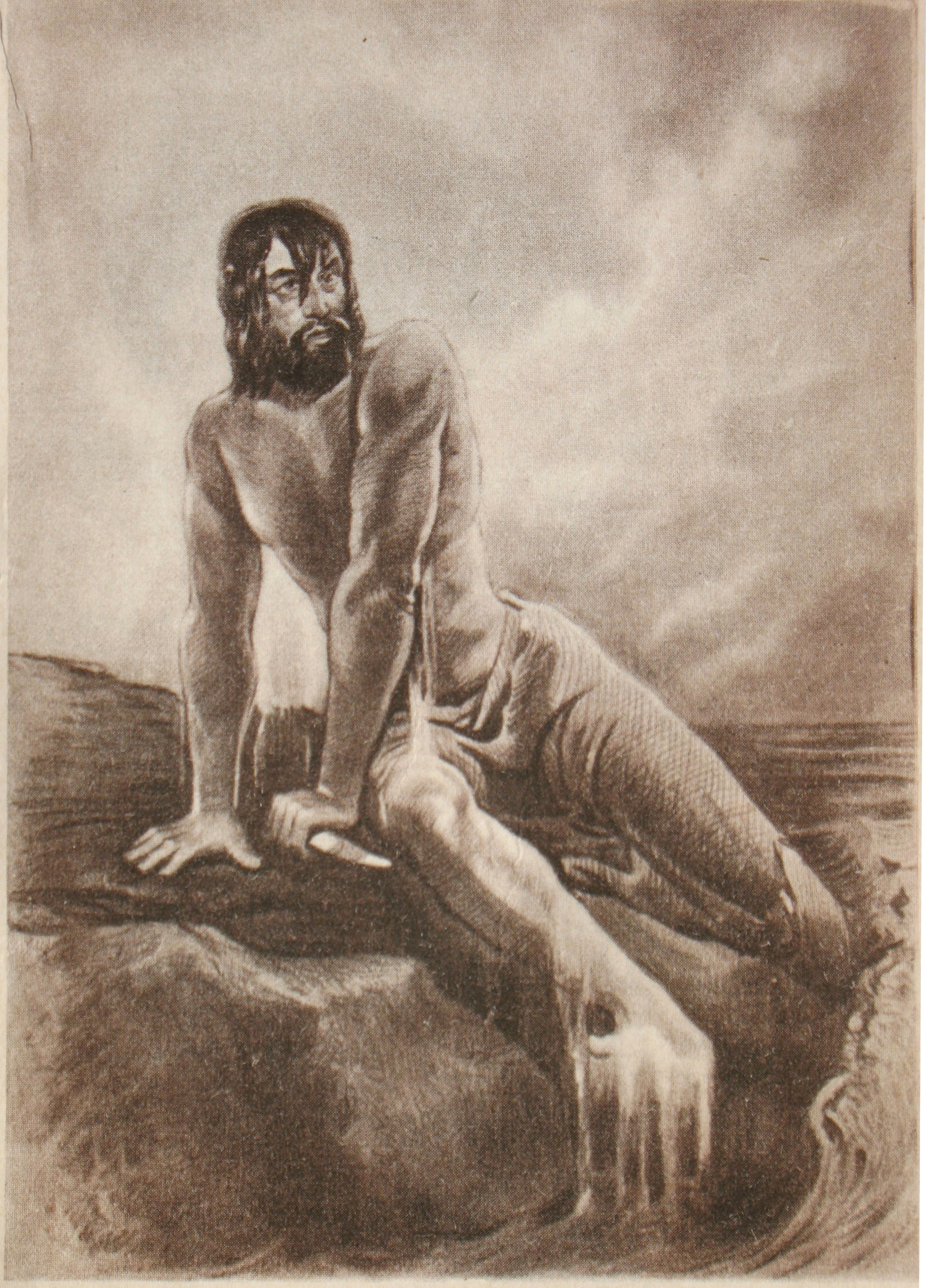 Dantès sur son rocher, Paul Gavarni picture pour Monte Cristo d'Alexandre Dumas (1846). Поль Гаварни. Эдмон Дантес сразу после побега из замка Иф в феврале 1829. Рисунок из издания романа 1846 года, репродуцированный в московском издании.